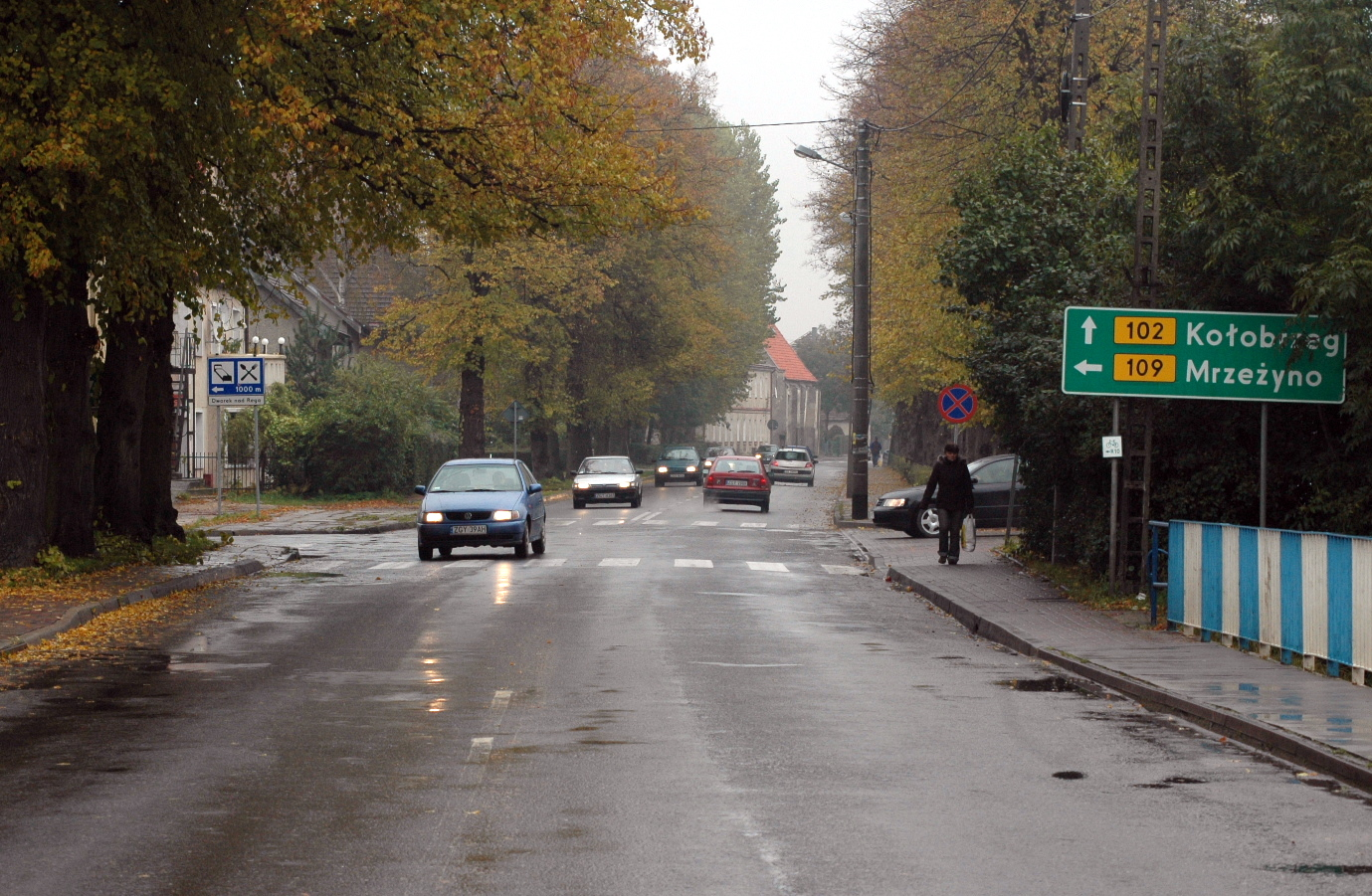 Droga wojewódzka nr 102 w Trzebiatowie.